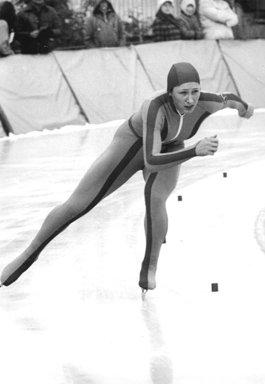 Karin Enke ADN-ZB Thieme 25.11.83 Karl-Marx-Stadt: Eisschnellauf-Länderkampf DDR-UdSSR Sprintweltmeisterin Karin Enke war am ersten Tag auf der 500-m- und 1000-m-Strecke nicht zu schlagen. Die 22-jährige Dresdnerin bewältigte die 500-m-Distanz in 41,03 s. -Achtung! Foto von früherem Wettkampf- Abgebildete Personen: Enke, Karin: Eisschnelläuferin, DDR